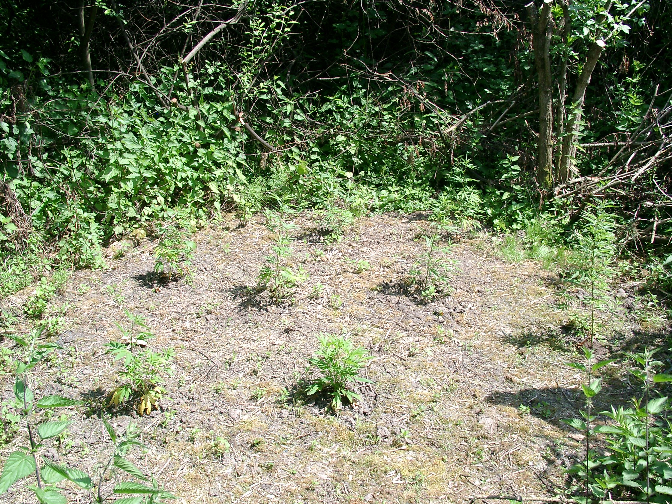 Feld mit jungen Hanfpflanzen.jpg